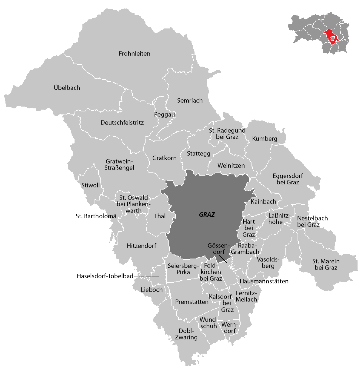 Gemeinden im Bezirk Graz-Umgebung (Steiermark), Stand: 1. Januar 2015